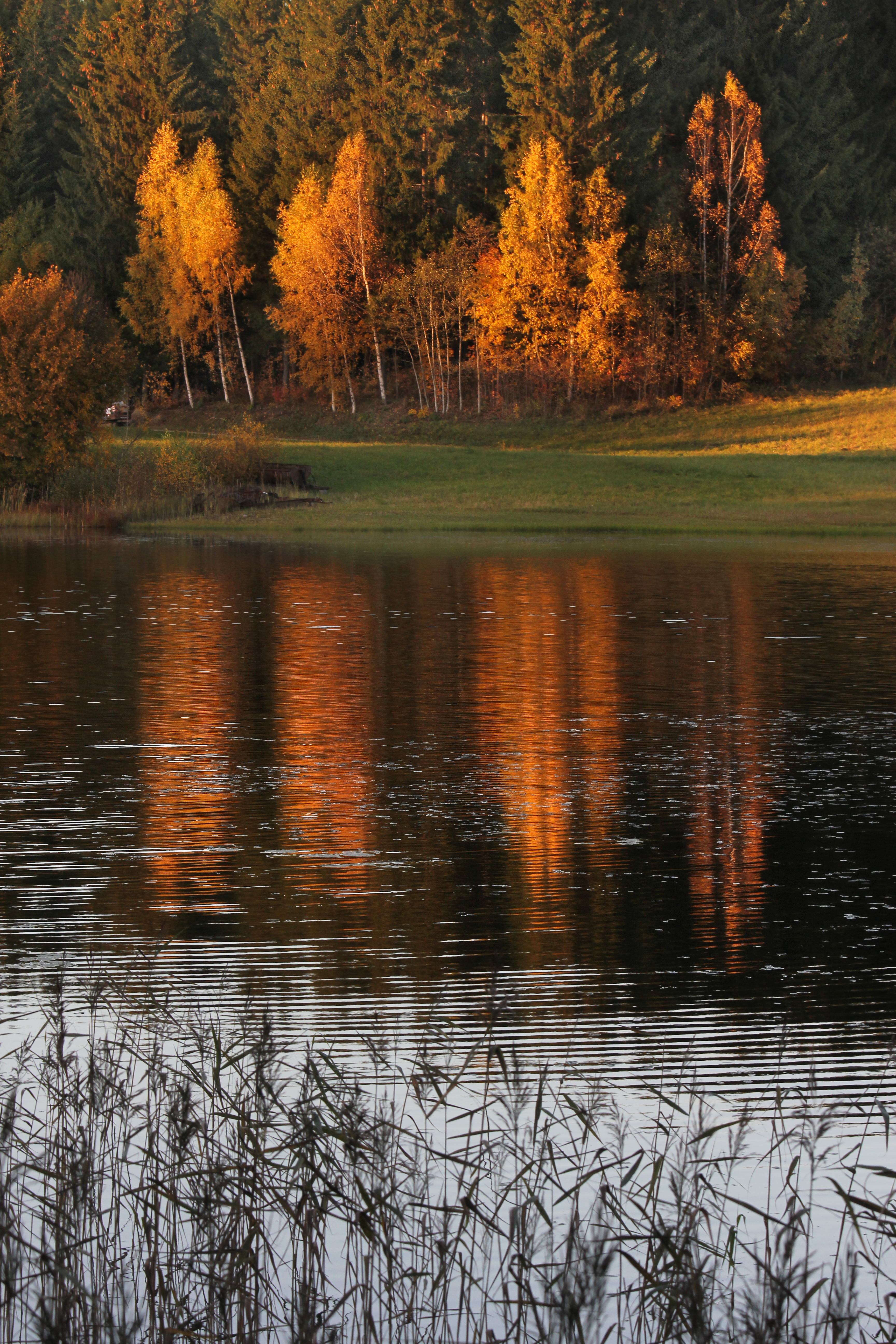 Peegeldused õhtupäikesest Kavadi järvevees